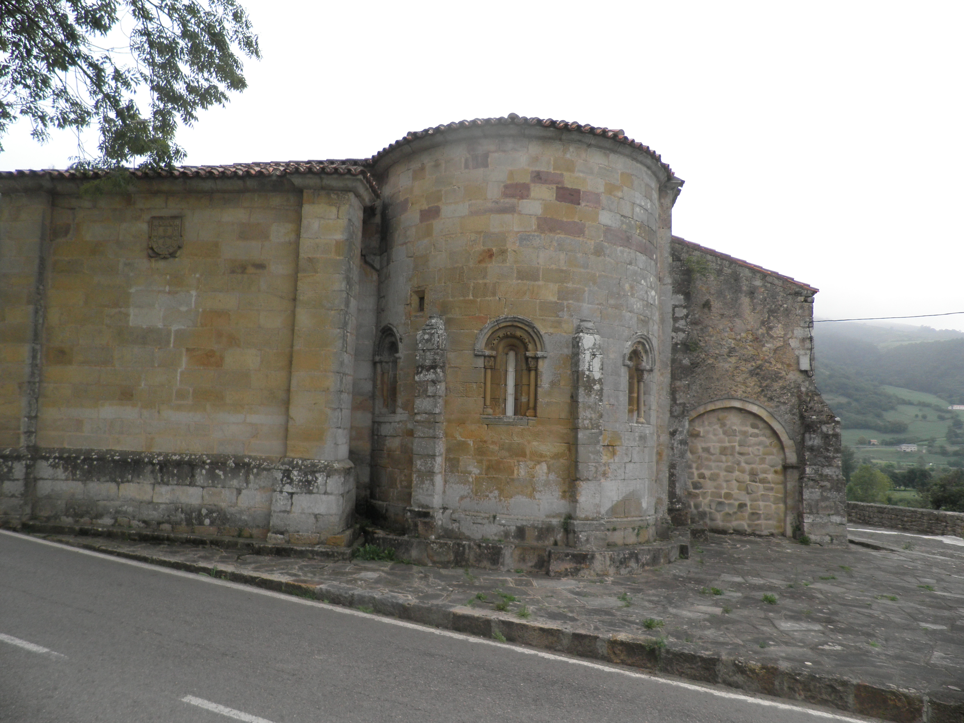 Àbsis de l'esglèsia de Santa Cecília a Villasevil (Santiurde de Toranzo, Cantàbria)